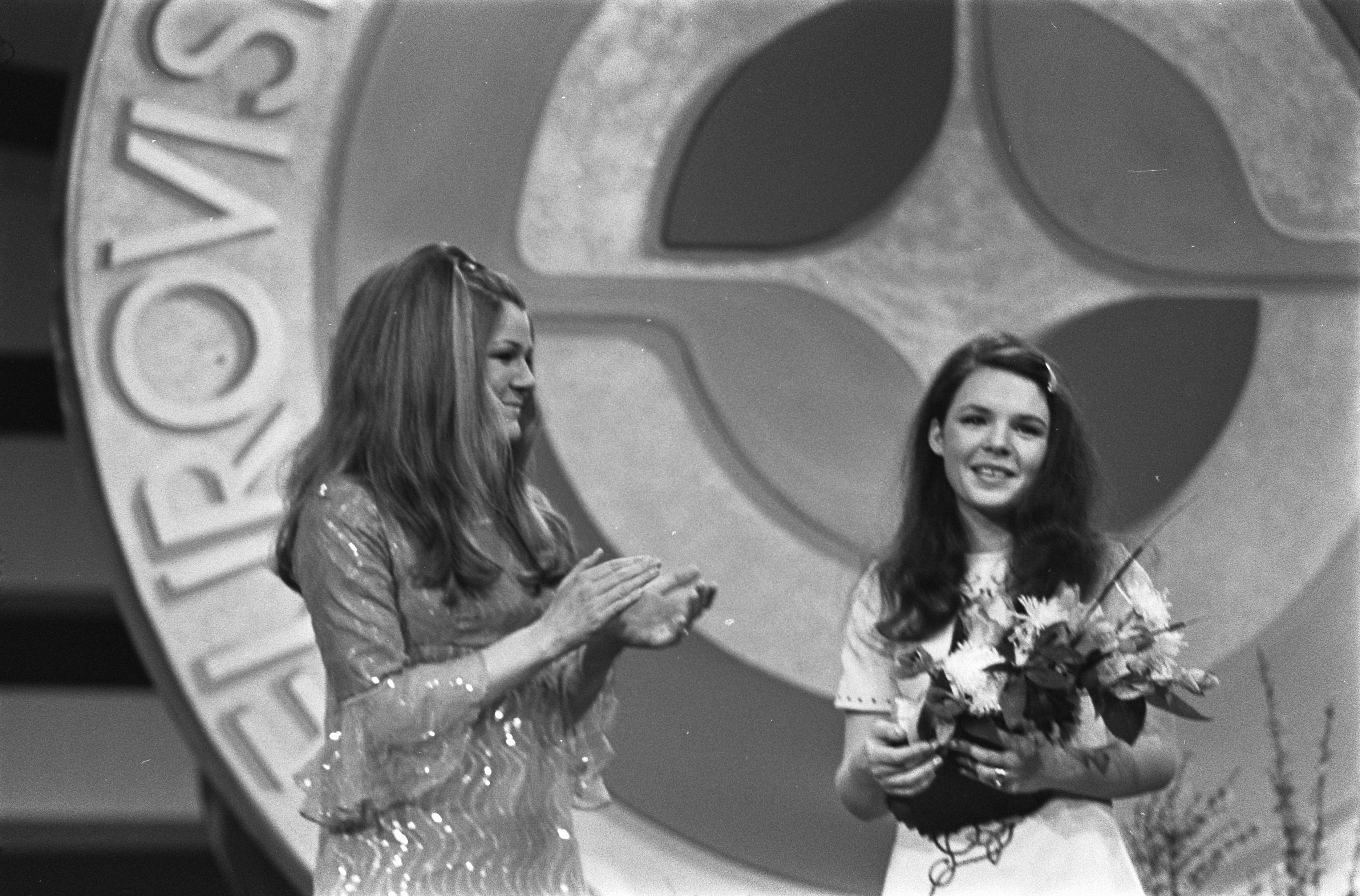 Collectie / Archief : Fotocollectie Anefo Reportage / Serie : Eurovisie Songfestival 1970 in RAI te Amsterdam Beschrijving : Lenny Kuhr en winnares Dana Datum : 21 maart 1970 Locatie : Amsterdam, Noord-Holland Trefwoorden : artiesten, songfestivals, zangers Persoonsnaam : Dana, Kuhr, Lenny Instellingsnaam : Eurovisie Song Festival Fotograaf : Koch, Eric / Anefo Auteursrechthebbende : Nationaal Archief Materiaalsoort : Negatief (zwart/wit) Nummer archiefinventaris : bekijk toegang 2.24.01.05 Bestanddeelnummer : 923-3704